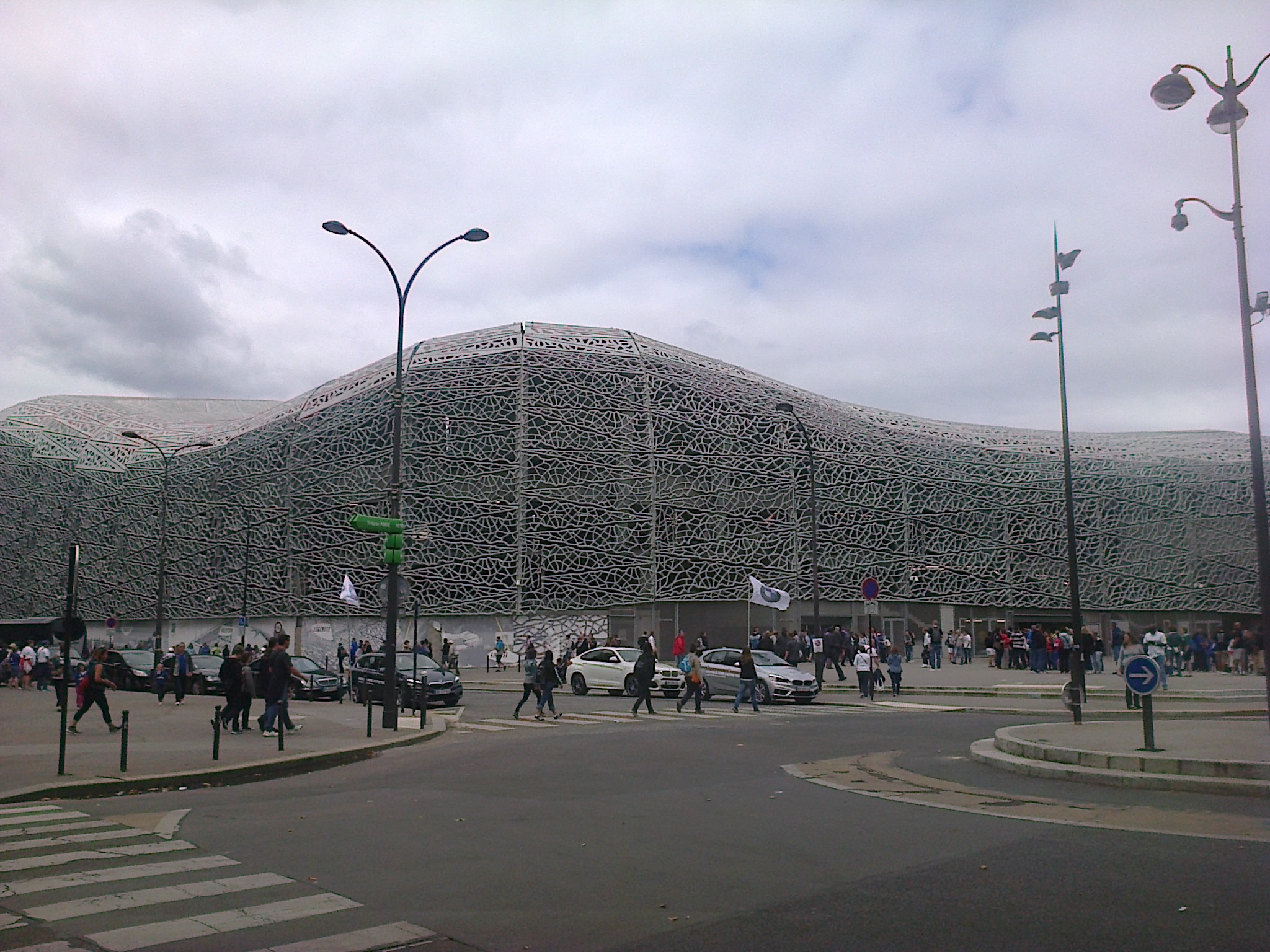 Abords du Stade Jean-Bouin avant les finales de la Coupe du Monde 2014.